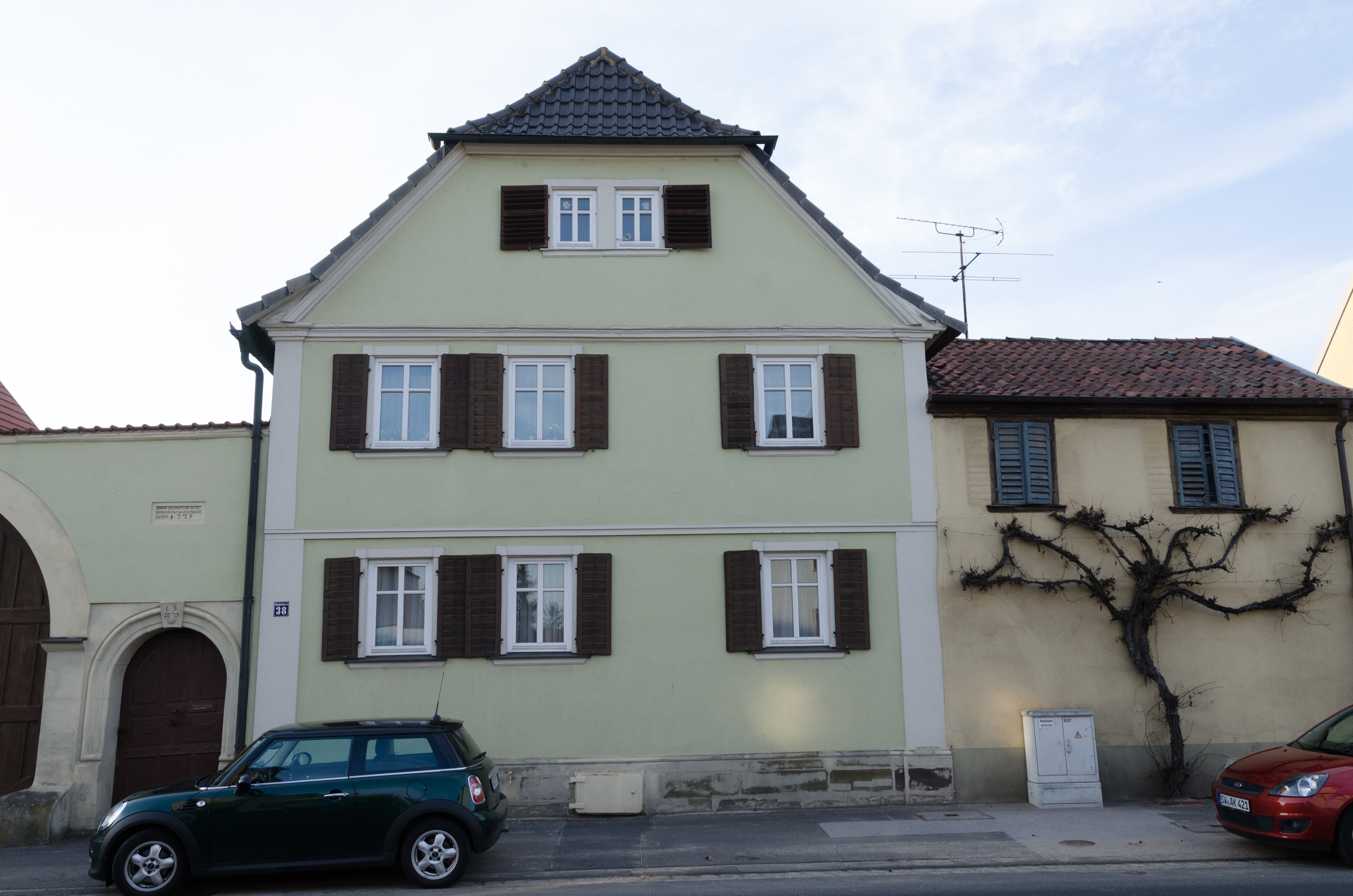 Schweinfurt Oberndorf, Hauptstraße 38